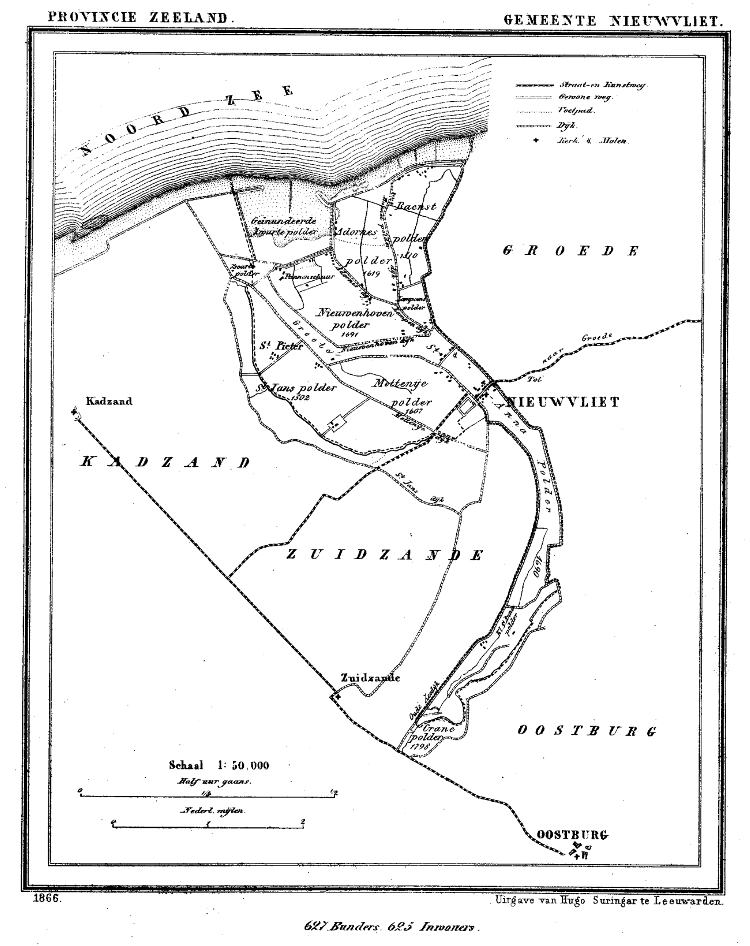 Gemeente Nieuwvliet, Zeeland, Nederland